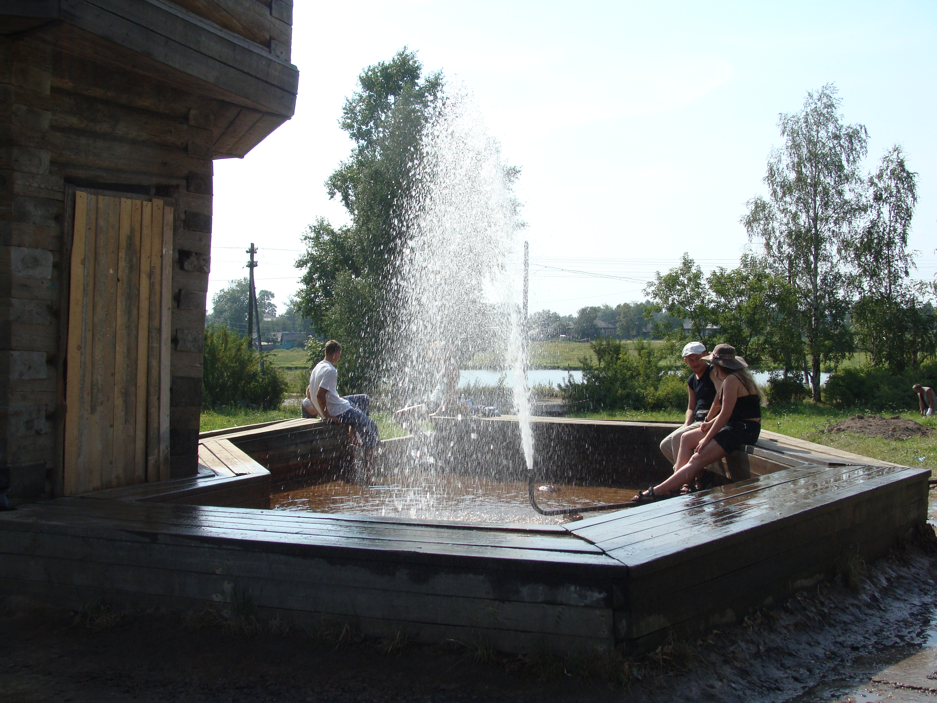 Фестиваль Козьмы Пруткова 23 июля 2011 года